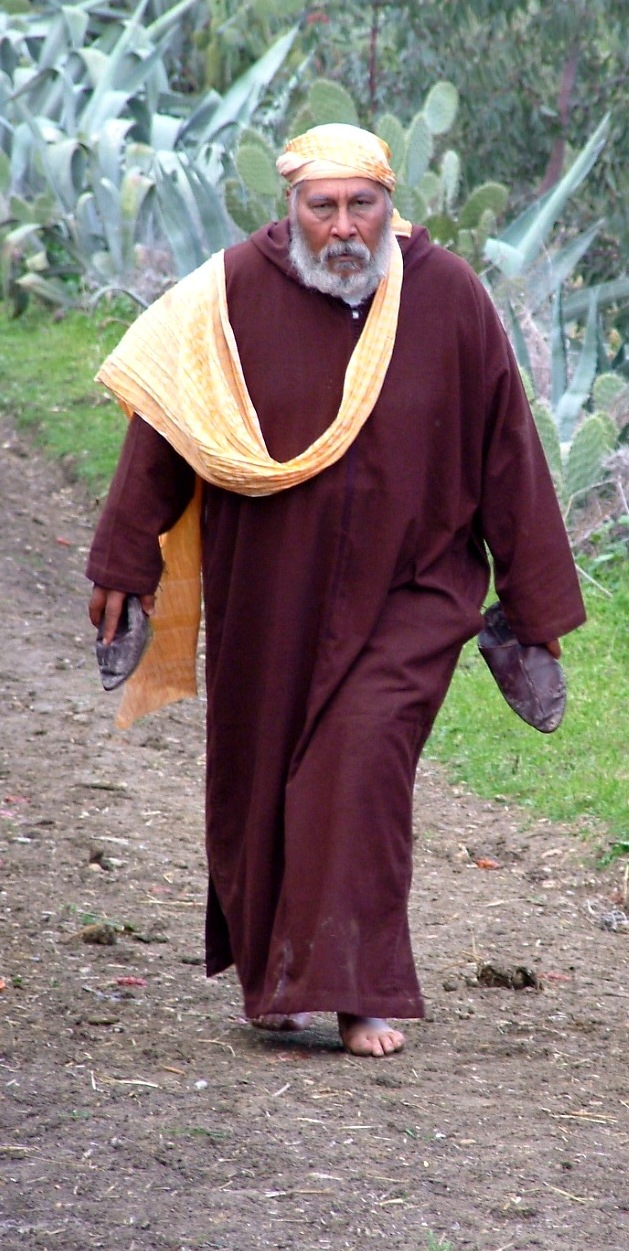 Feuilleton Wouja'e Trabe, adapté de La Terre, d'Emile Zola - Diffusé sur 2M depuis 2005.